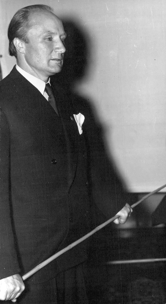 "När lägenheter om ett rum och kök byggs på löpande band som familjebostäder, då ha vi spårat ur på bostadsområdet" yttrade Malmöbyggmästaren Eric Sigfrid Persson, som på fredagen presenterade sin riksbekanta skapelse Friluftsstaden för sina kollegor Stockholmsbyggmästarna. Ovan ses byggmästare Persson under föredraget som ledsagades av ljusbilder och en vacker färgfilm från Friluftsstaden.